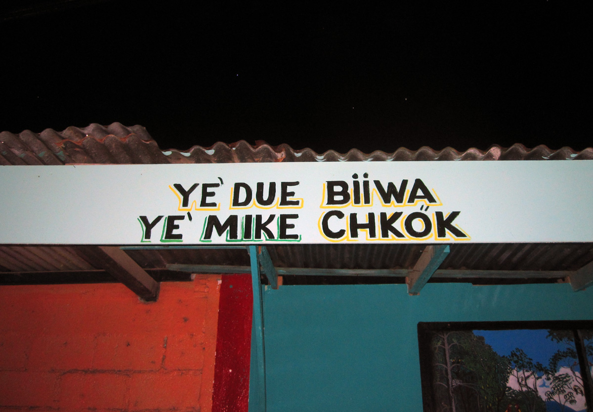 Skilt på bribri på en restaurant i Bribrí i Talamanca i Costa Rica. Oversettelse: «Jeg er sulten, jeg går og spiser».